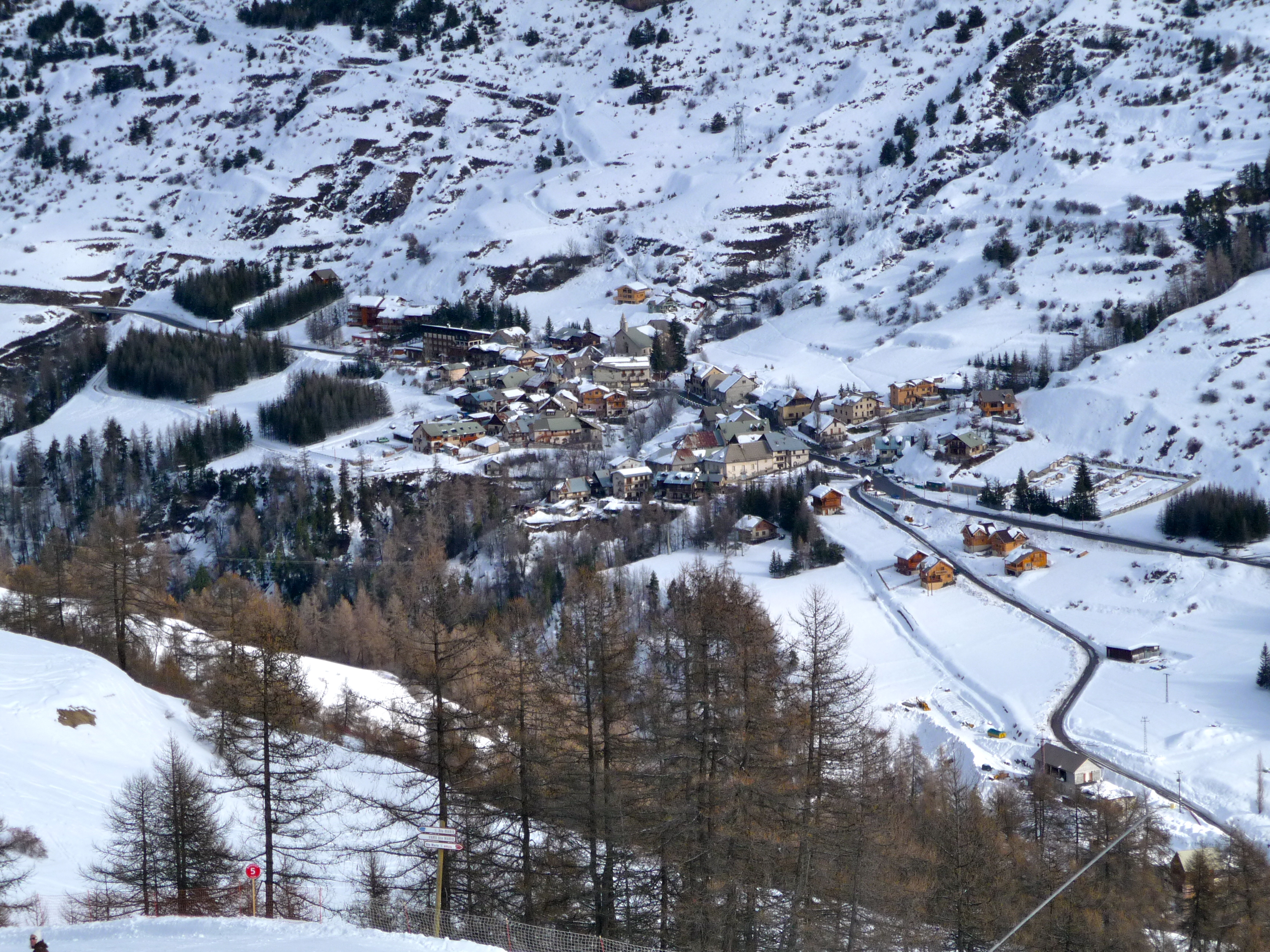 Le village de Vars-Saint-Marcelin depuis le domaine skiable de la Forêt Blanche